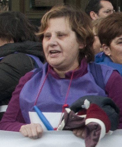 El tren de la libertad. Una de las mayores movilizaciones del movimiento feminista en España, para reivindicar el derecho a decidir de las mujeres. Arrancó de Gijón hasta Madrid con parada en Valladolid.